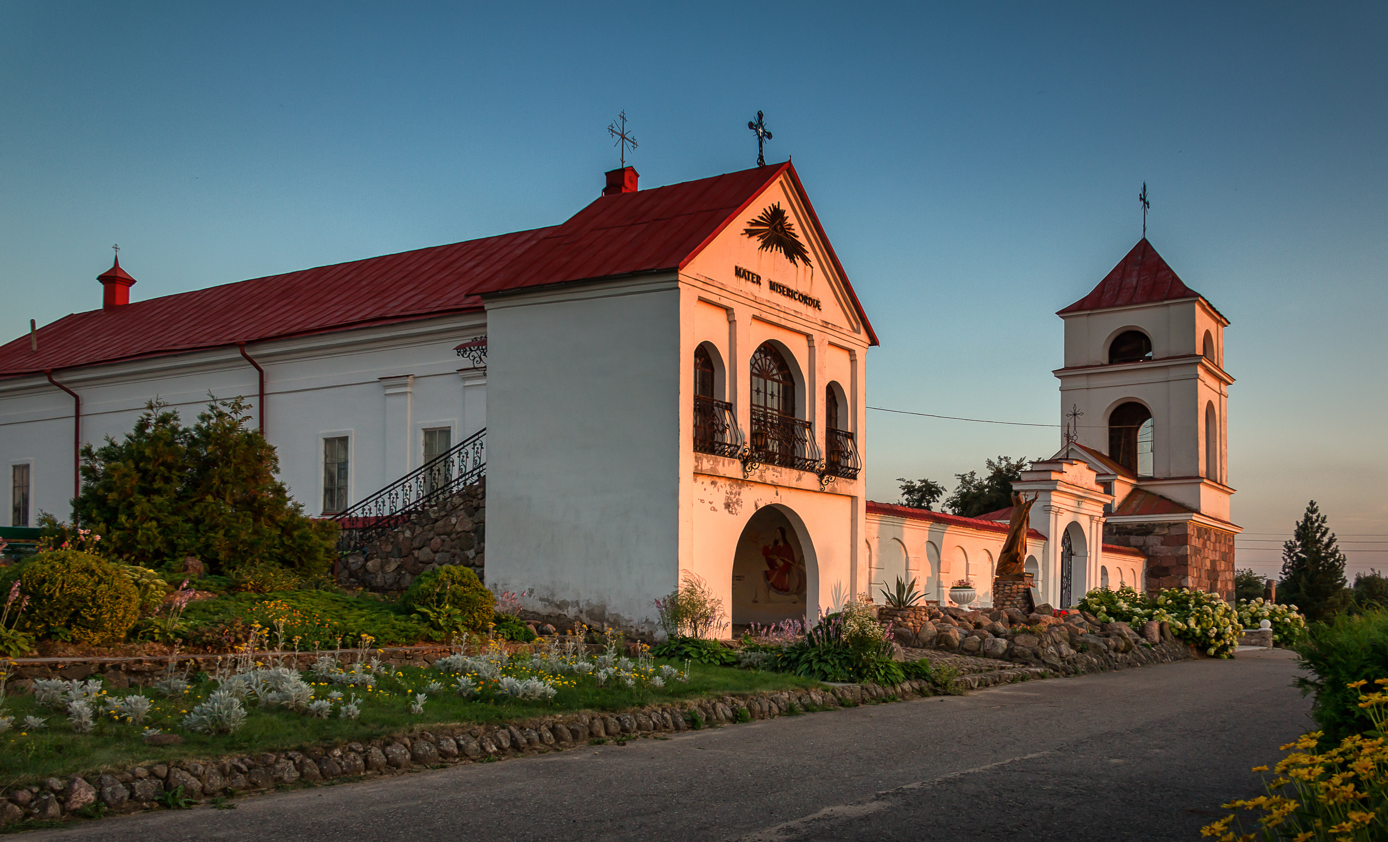 Беларуская (тарашкевіца): Касьцёл сьв. Ганны, 10 сюжэтных барэльефаў у інтэр’еры касьцёла. в. Мосар This is a photo of Belarusian heritage monument. Reference number: 212Г000397 ( WLM)